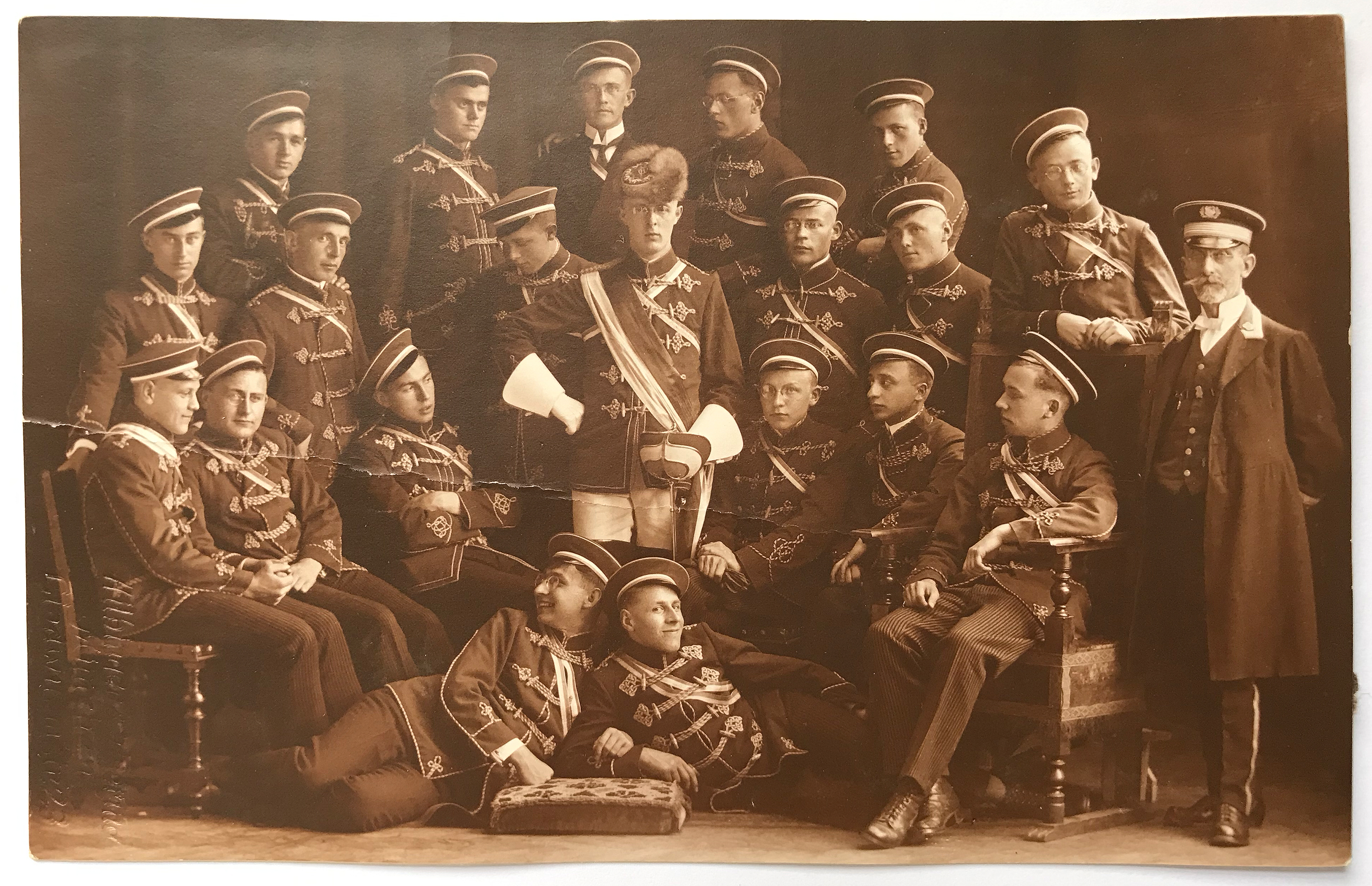 Studenten der Verbindung KBStV Rhaetia München. (Aufnahme Sommersemester 1924). Abfotografiert vom Originalabzug.